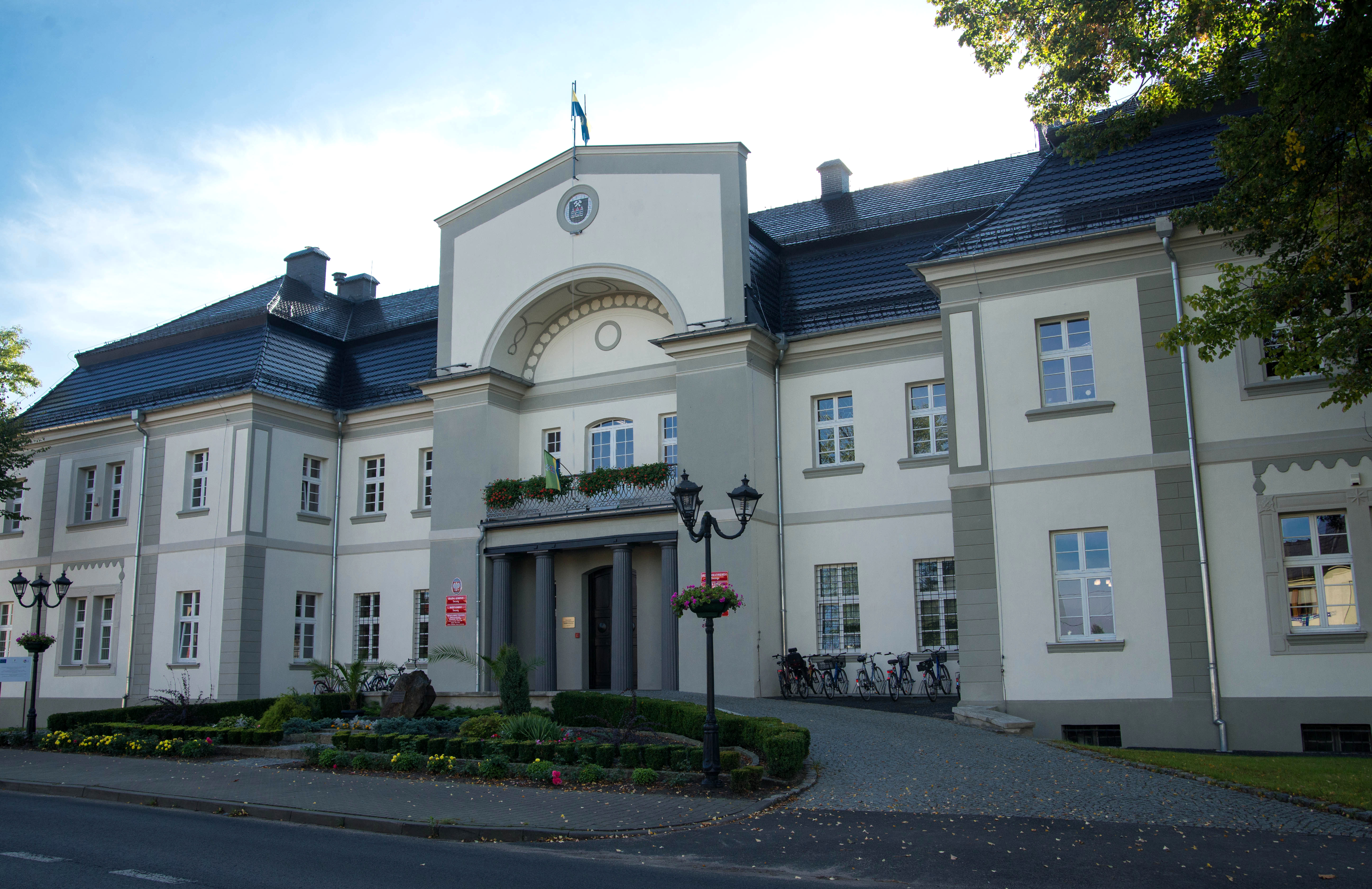 Tworóg, zamek, XVIII w.